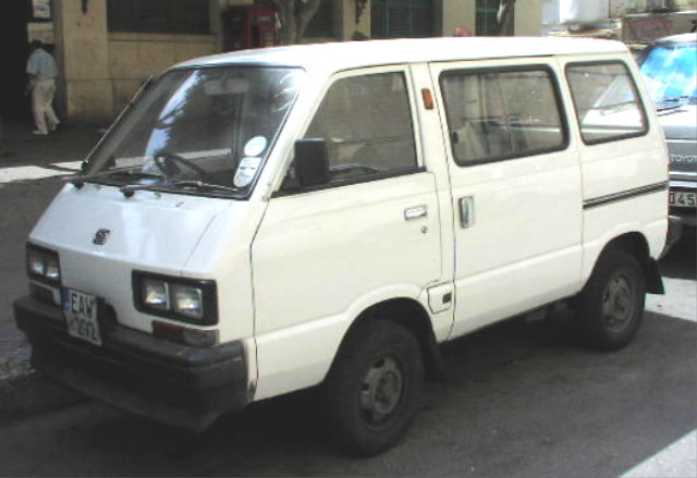 Subaru Libero E10